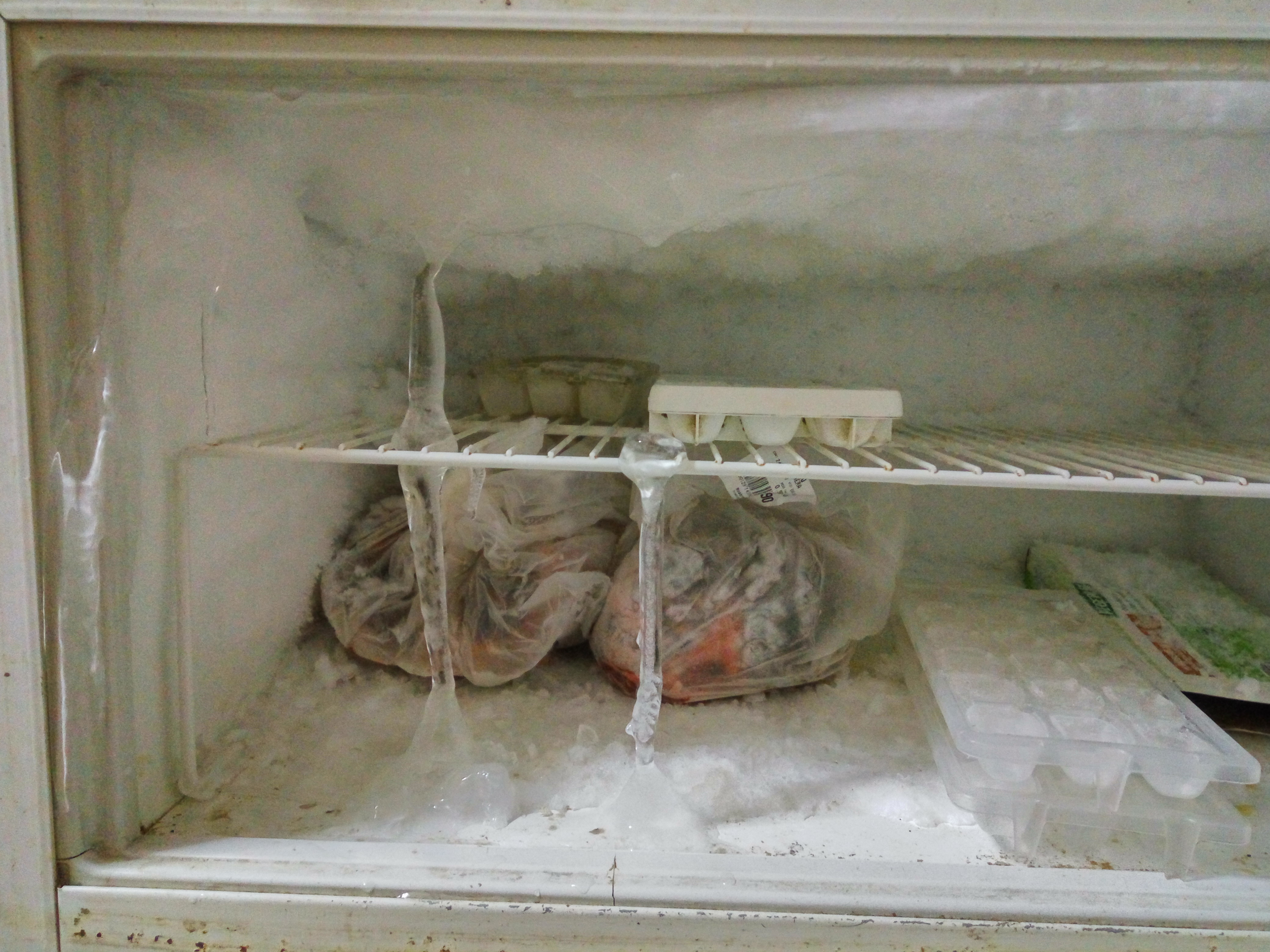 carámbanos formados al dejar una rendija en el congelador